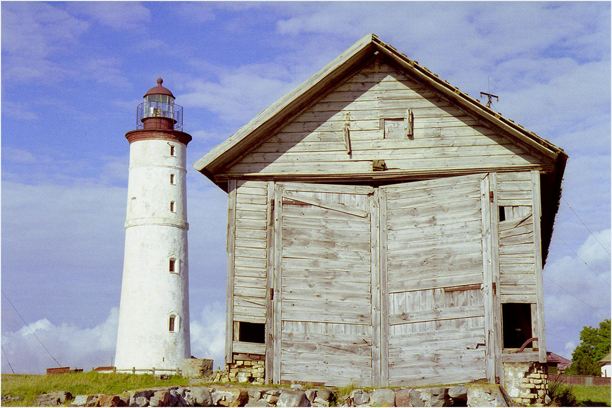 Vilsandi merepäästejaama paadikuur